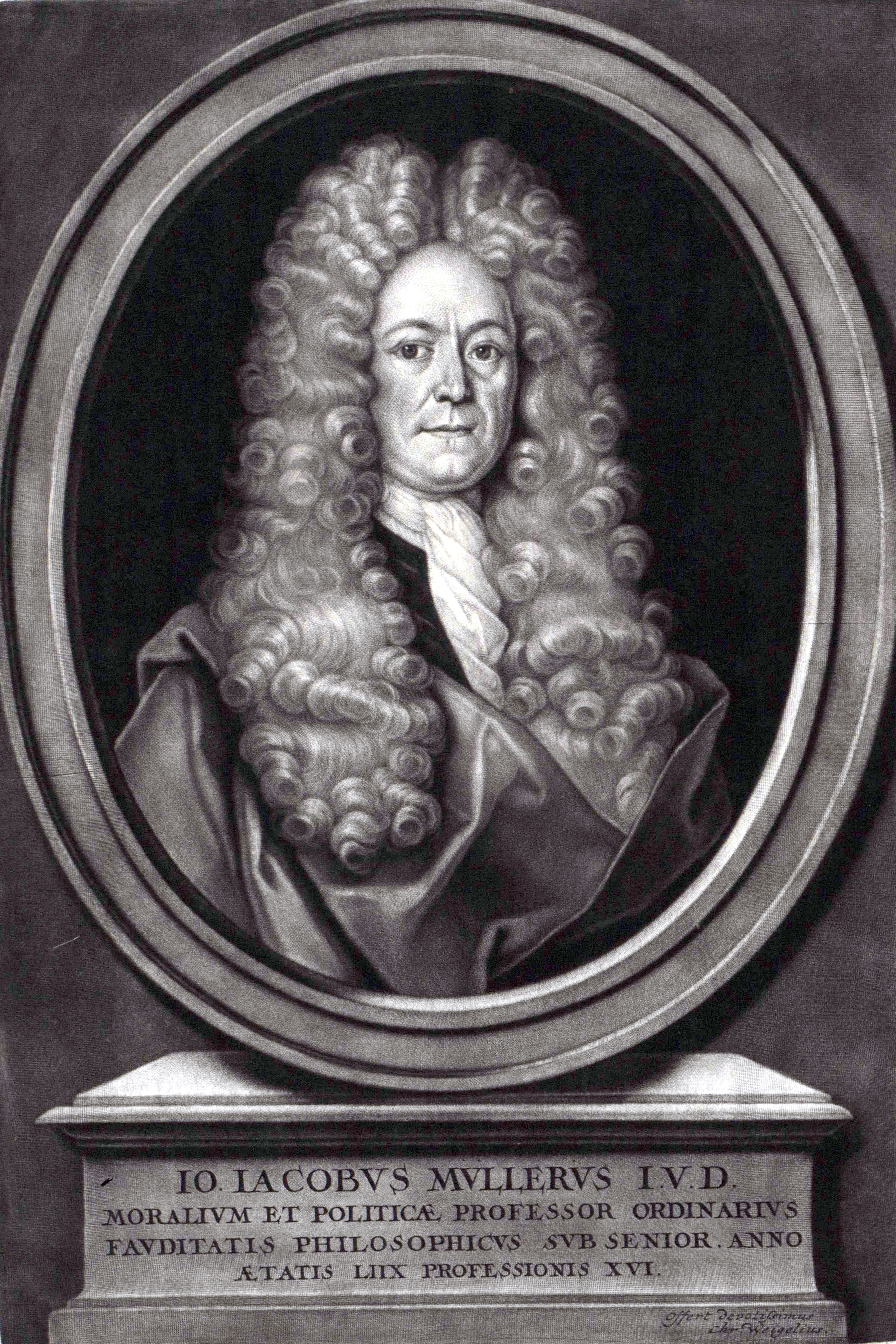 Johann Jakob Müller (1650-1716) deutscher Moralphilosoph und Logiker